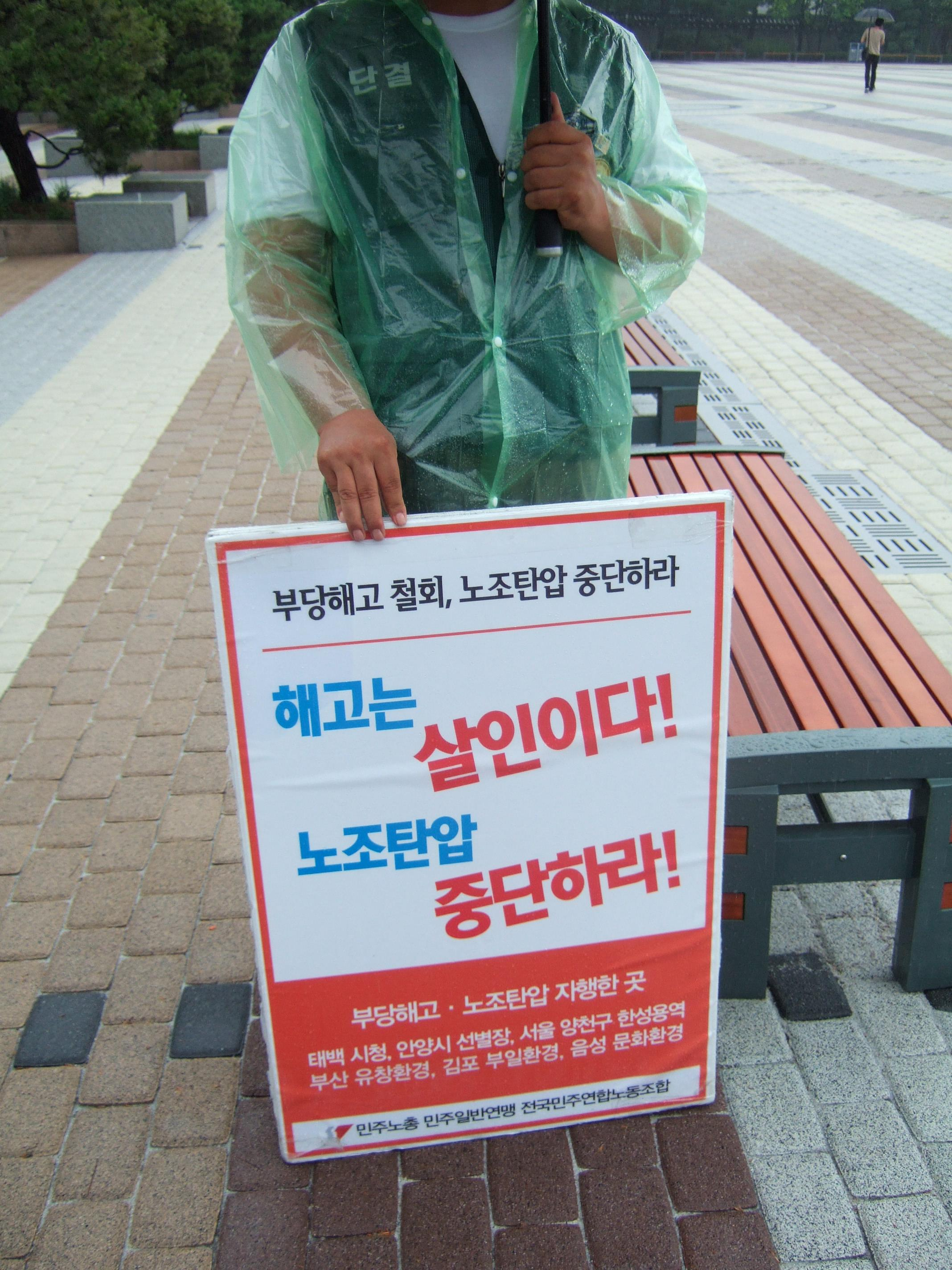 해고는 살인이다! 노조탄압 중단하라! 부당해고·노조탄압 자행한 곳 : 태백 시청, 안양시 선별장, 서울 양천구 한성용역, 부산 유창환경, 김포 부일환경, 음성 문화환경 민주노총 민주일반연명 전국민주연합노동조합 --- 청와대 앞, 신분증을 목에 걸친 사복요원들이 몇 걸음마다 깔린 그 곳에 비를 맞으며 묵묵히 시위를 하고 계셨습니다. 약자의 목소리가 있어야 한다는 점에서, 미약하나마 격려를 보내고 싶습니다.